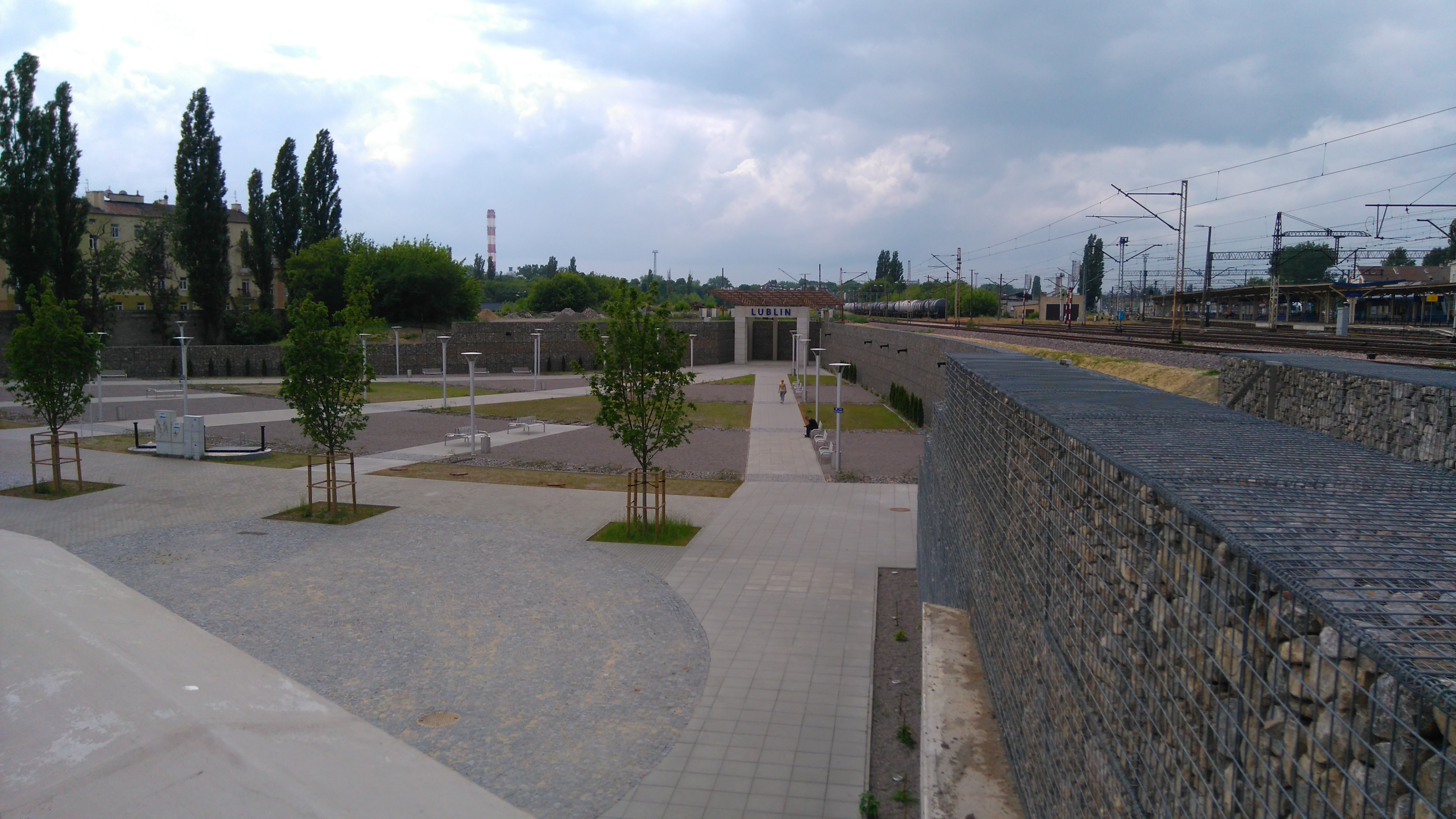 Skwer Oaza w Lublinie przy ulicy Kunickiego.